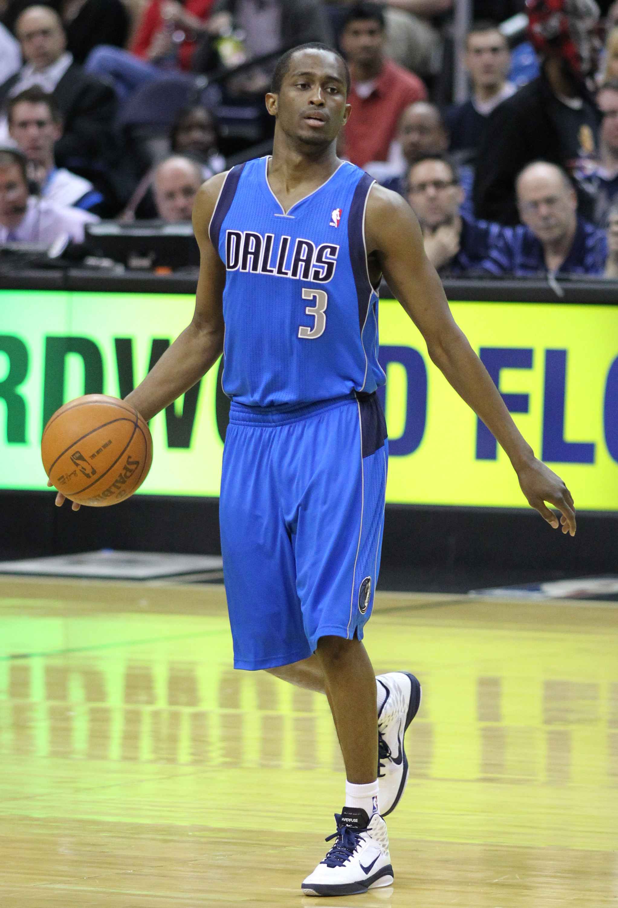 Wizards v/s Mavericks 02/26/11